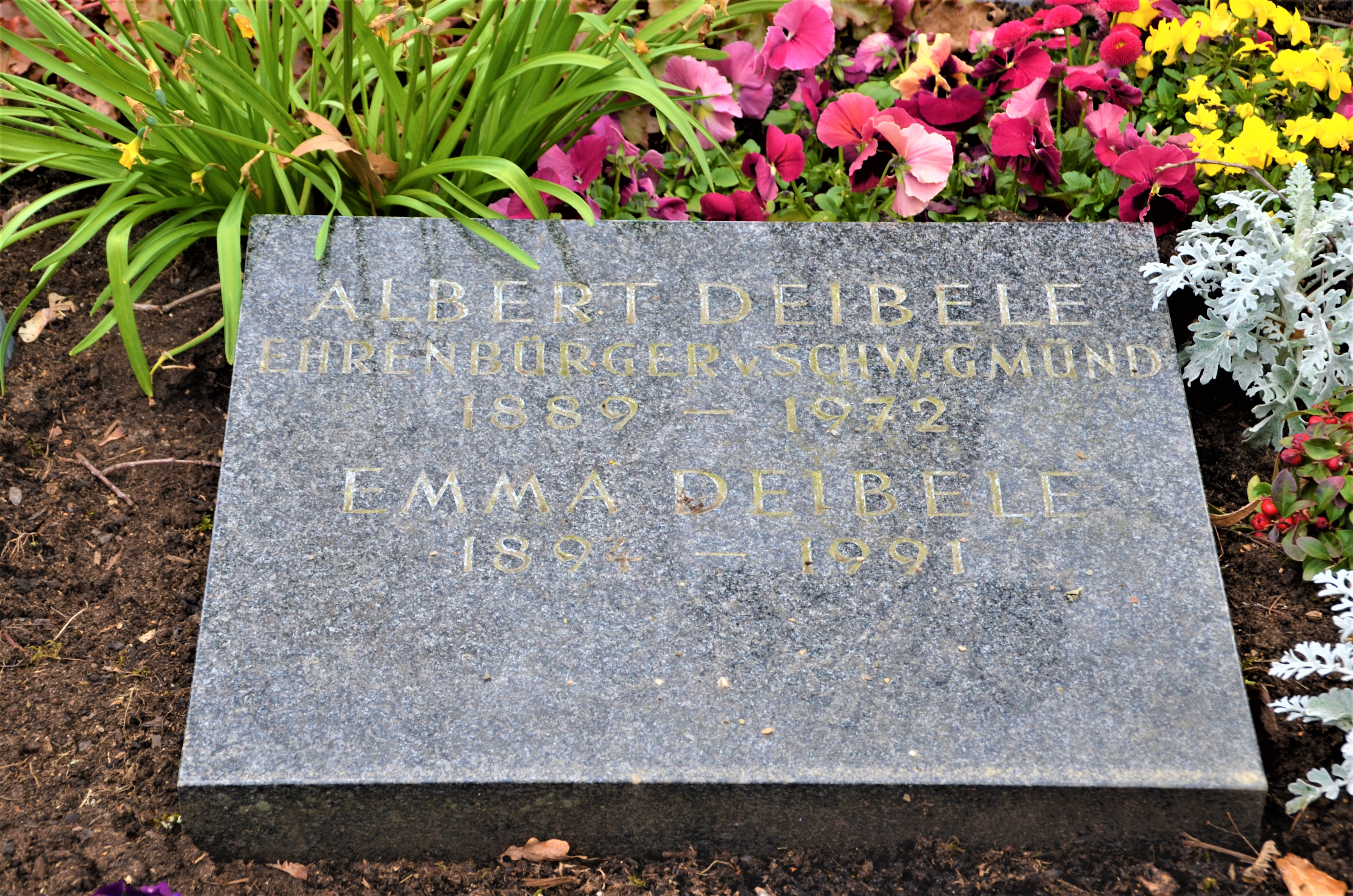 Grabplatte von Stadtarchivar und Ehrenbürger Albert Deibele und auf dem Leonhardsfriedhof Schwäbisch Gmünd